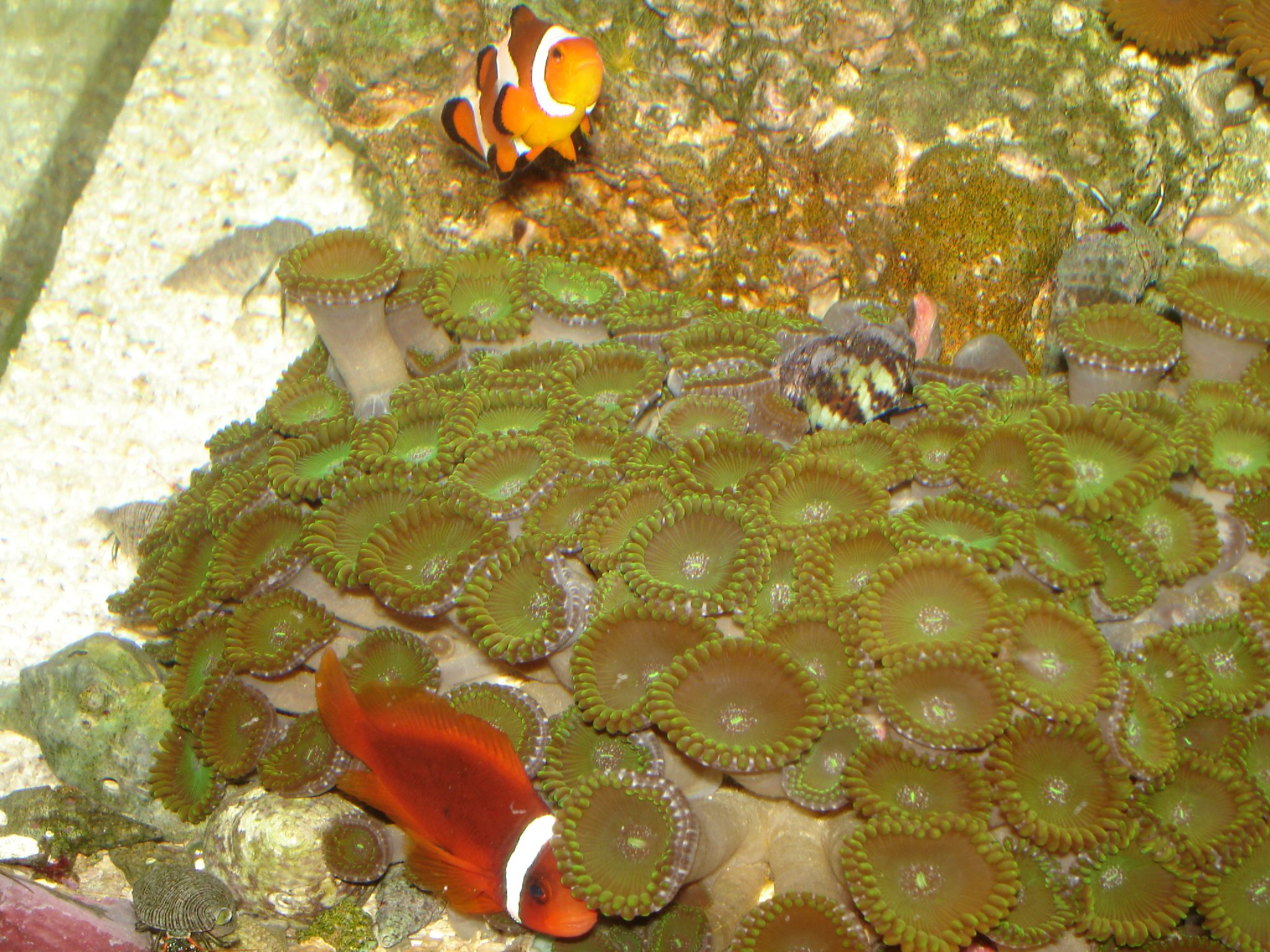 Zoanthus (pseudo Anêmona)